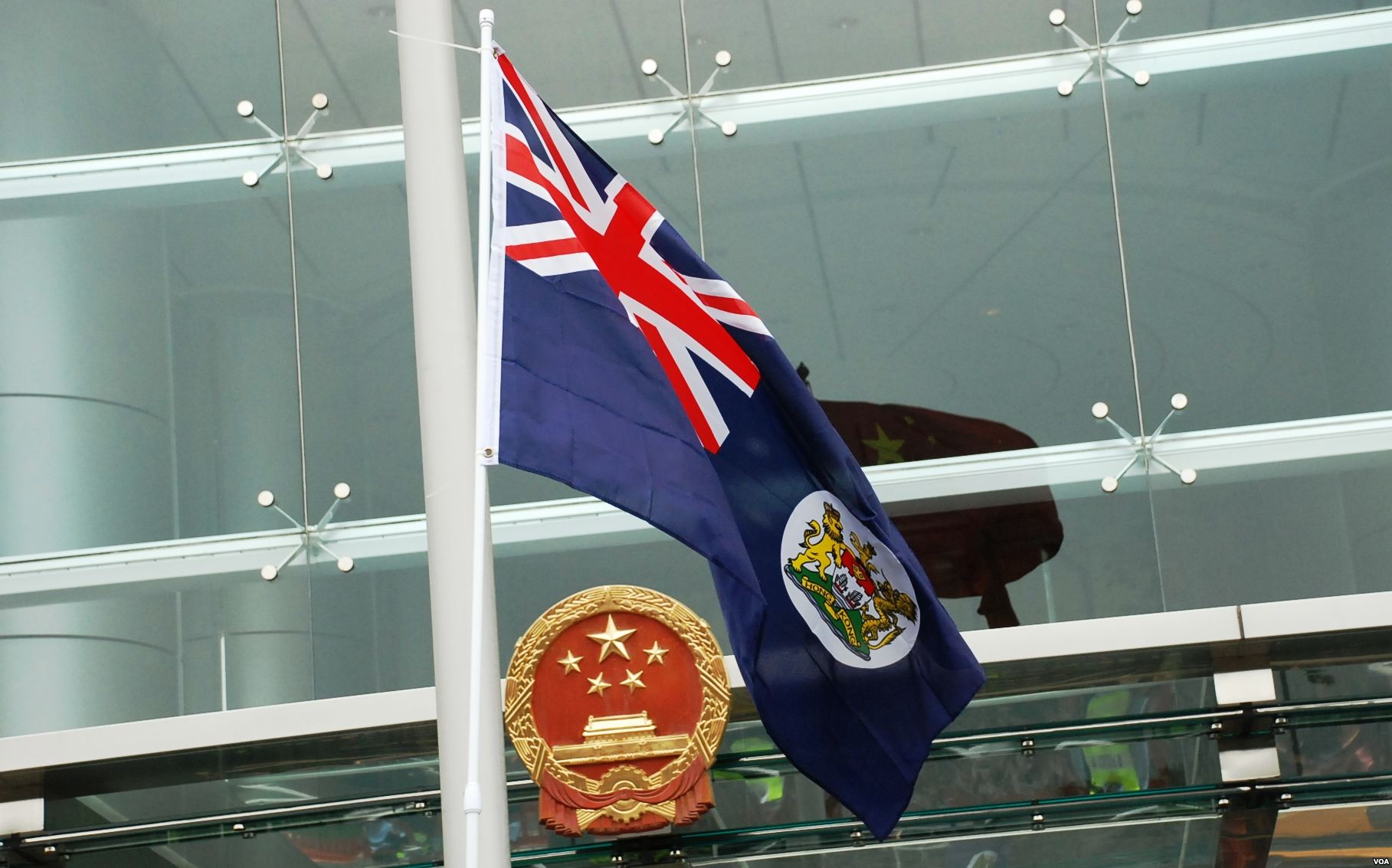 香港示威人士趁中國國慶日在中聯辦門外揮舞港英旗幟，要求北京尊重香港一國兩制、高度自治